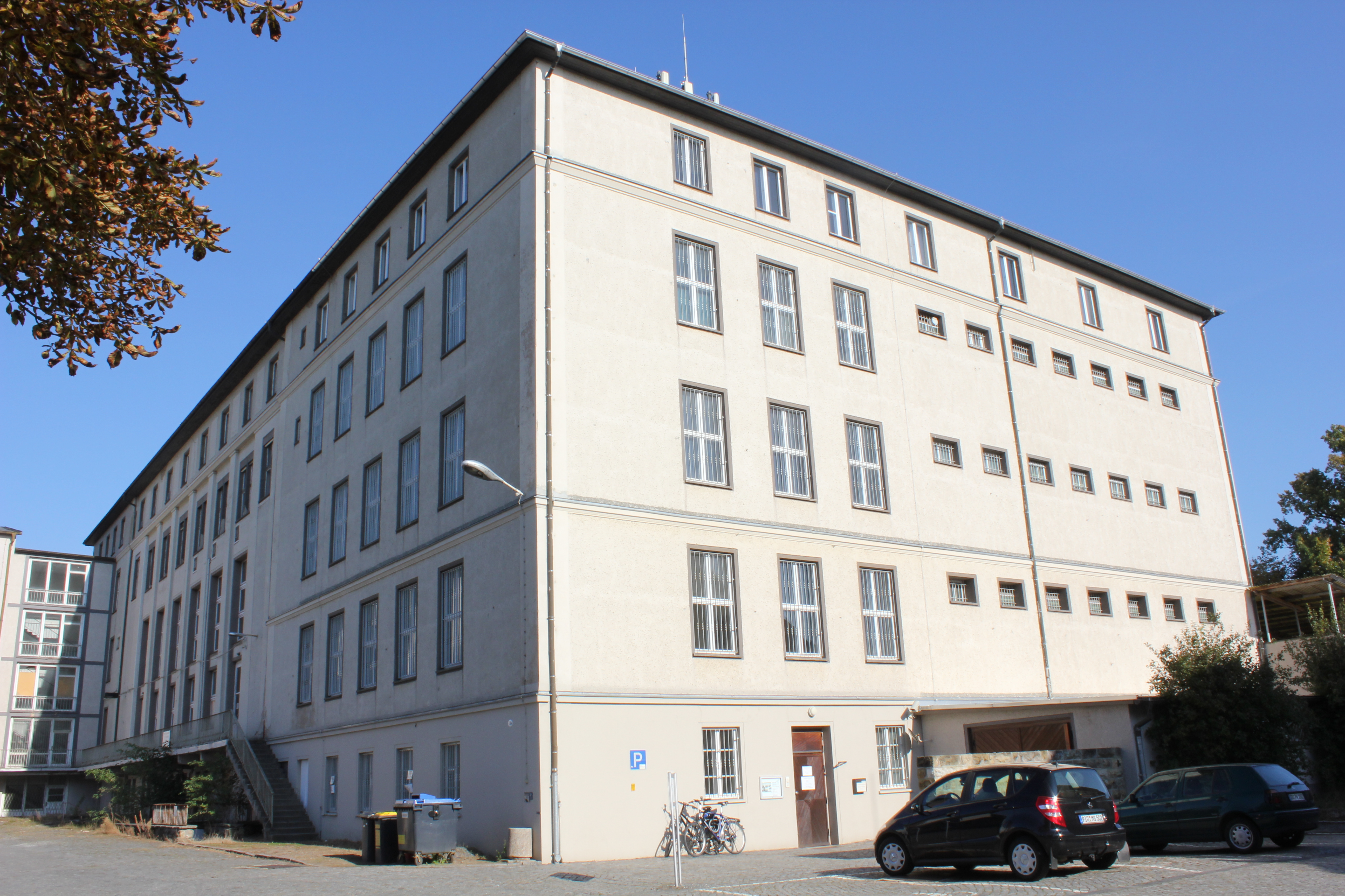 Gedenkstätte Bautzner Straße, Dresden. Untersuchungshaftanstalt der „Stasi“ im Freistaat Sachsen